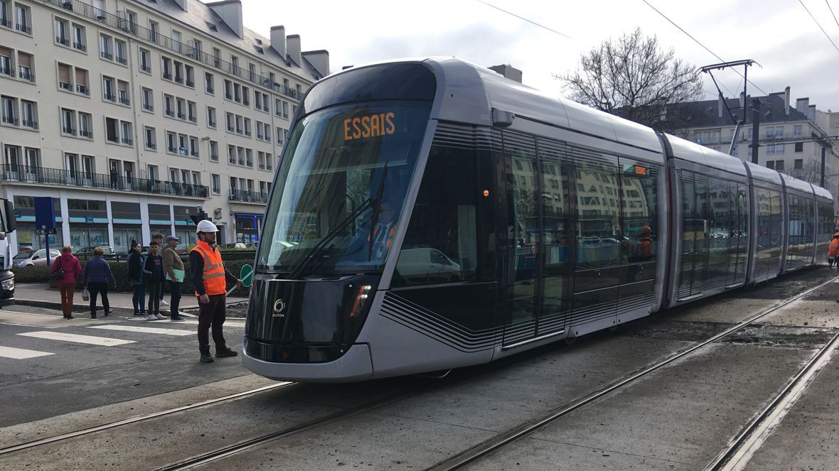 le nouveau Tramway de Caen 2019